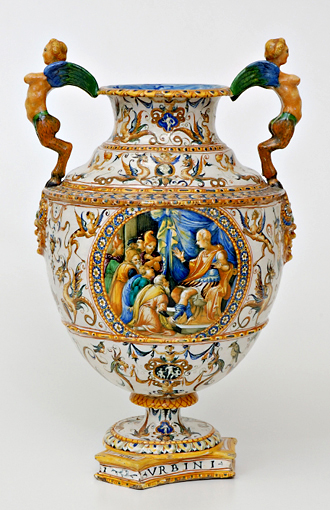 Vaso di Urbino dipinto a grottesche di Antonio Patanazzi. XVI secolo